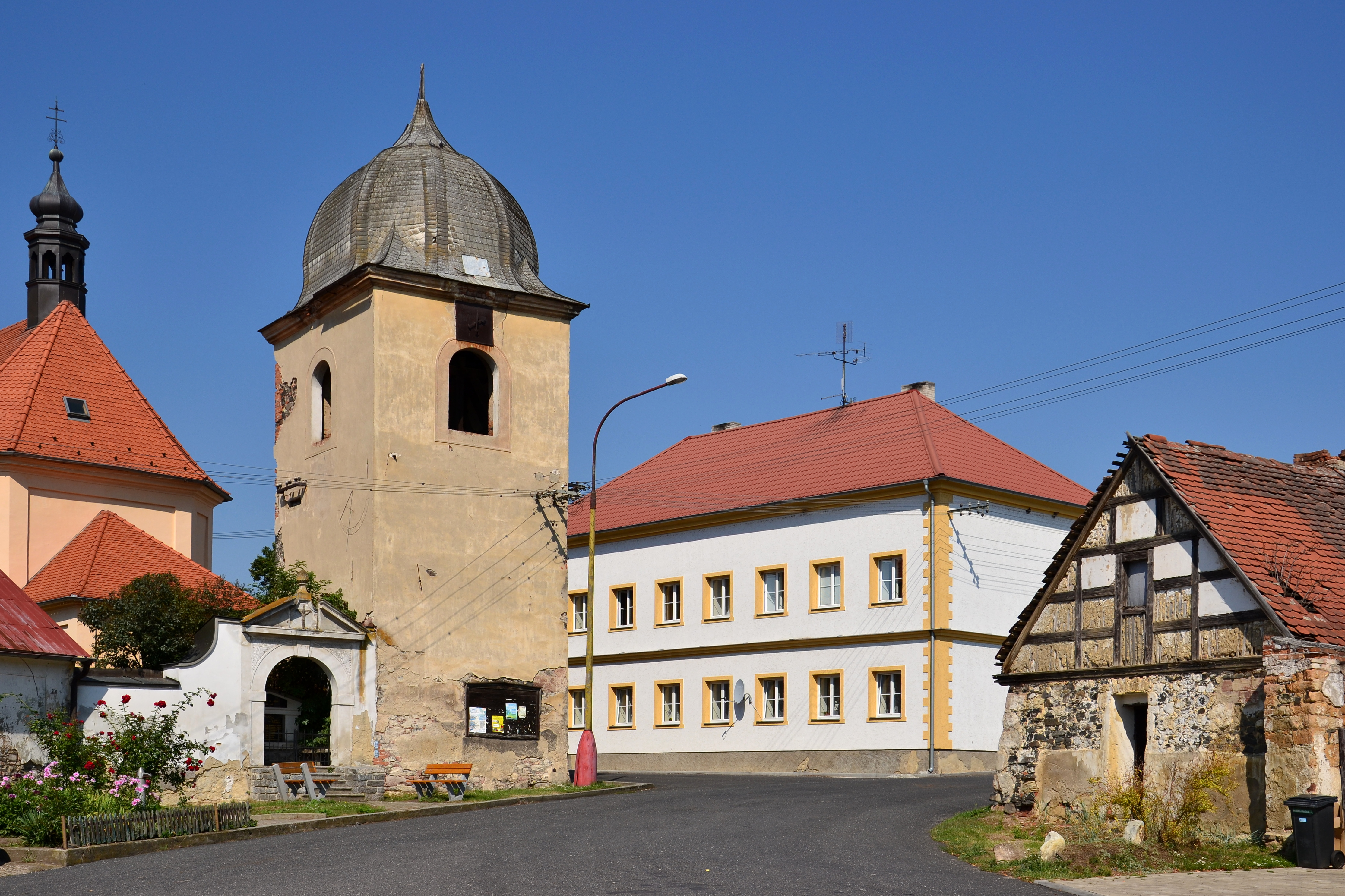 Kostel svatého Jakuba - zvonice, Veliká Ves, Veliká Ves (okres Chomutov).